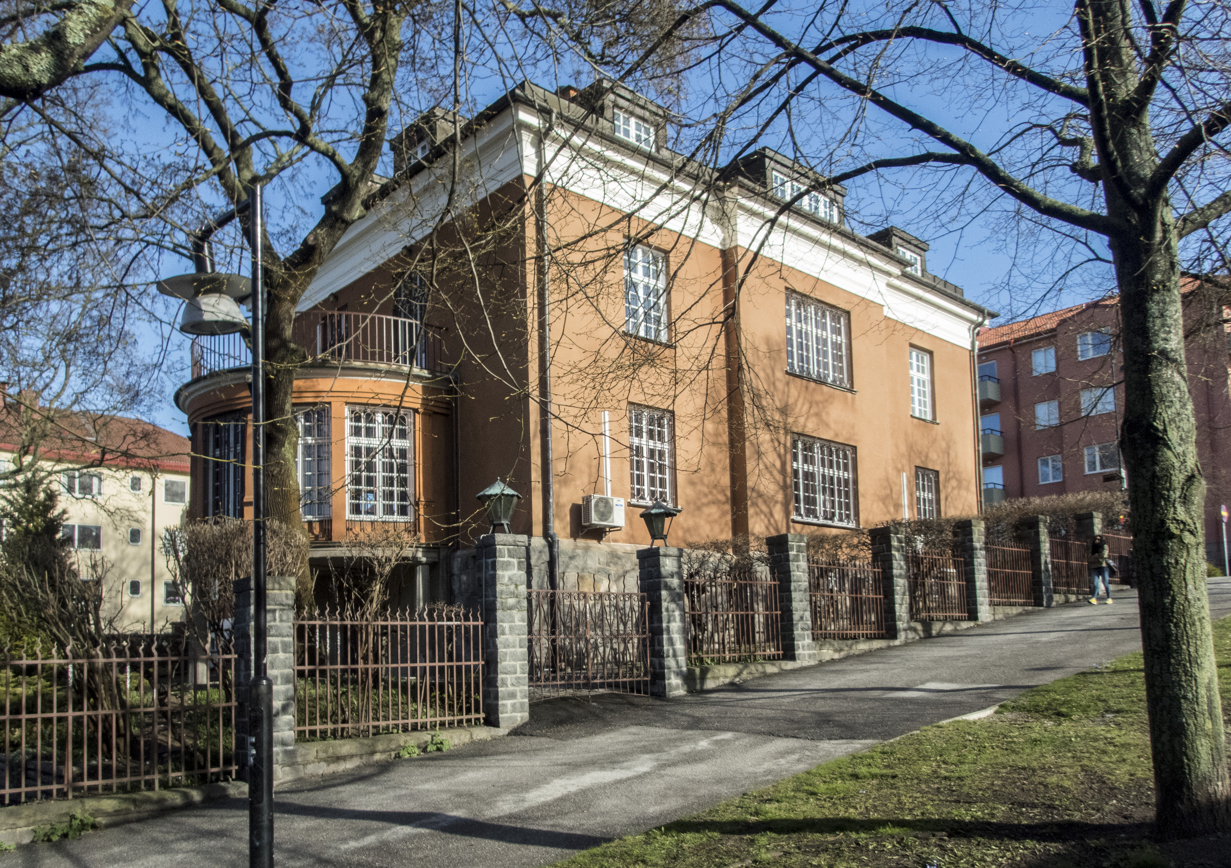 Villa Nilsbo, Tallbacken 2 Sundbyberg, inrymmande Polska generalkonsulatet